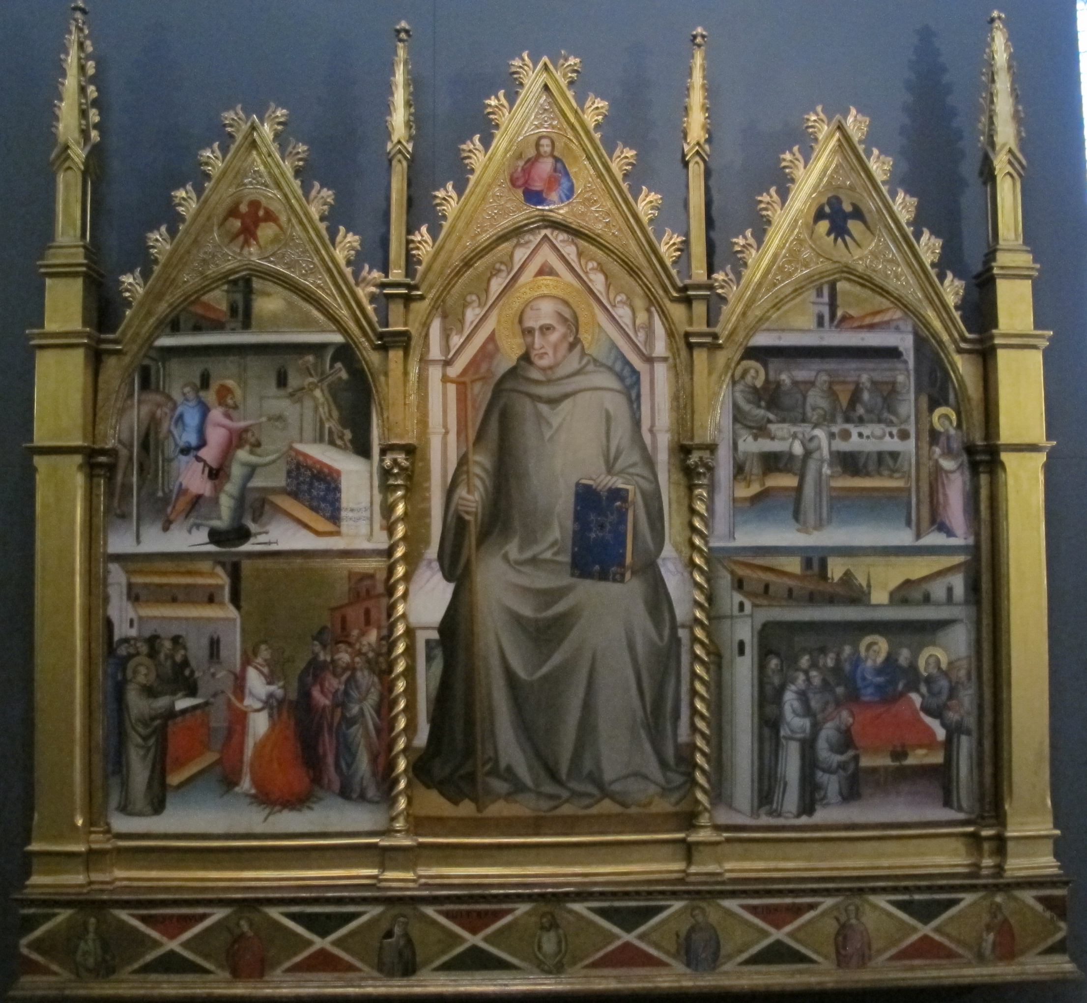 Giovanni del biondo, san giovanni gualberto e storie della sua vita, 1370 ca.